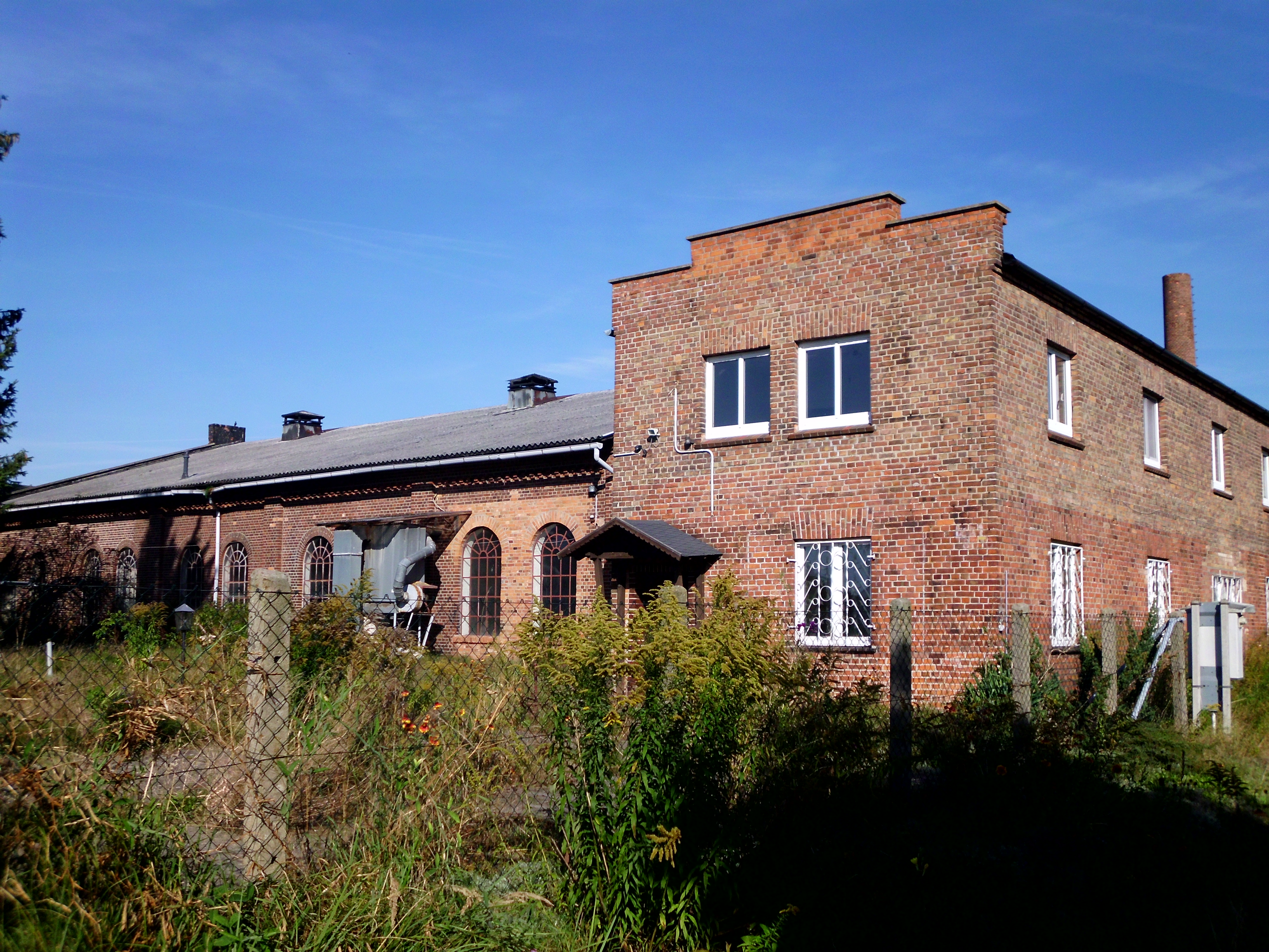 Richthalle des Reichsbahnausbesserungswerkes (RAW) Wittenberge zwischen der Lenzener Straße und Dergenthiner Straße